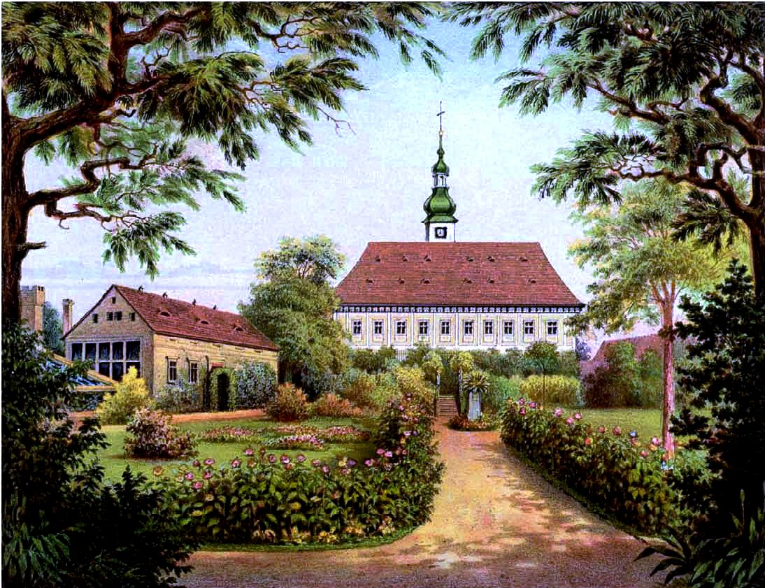 Schloss Schräbsdorf, Kreis Frankenstein, Provinz Schlesien